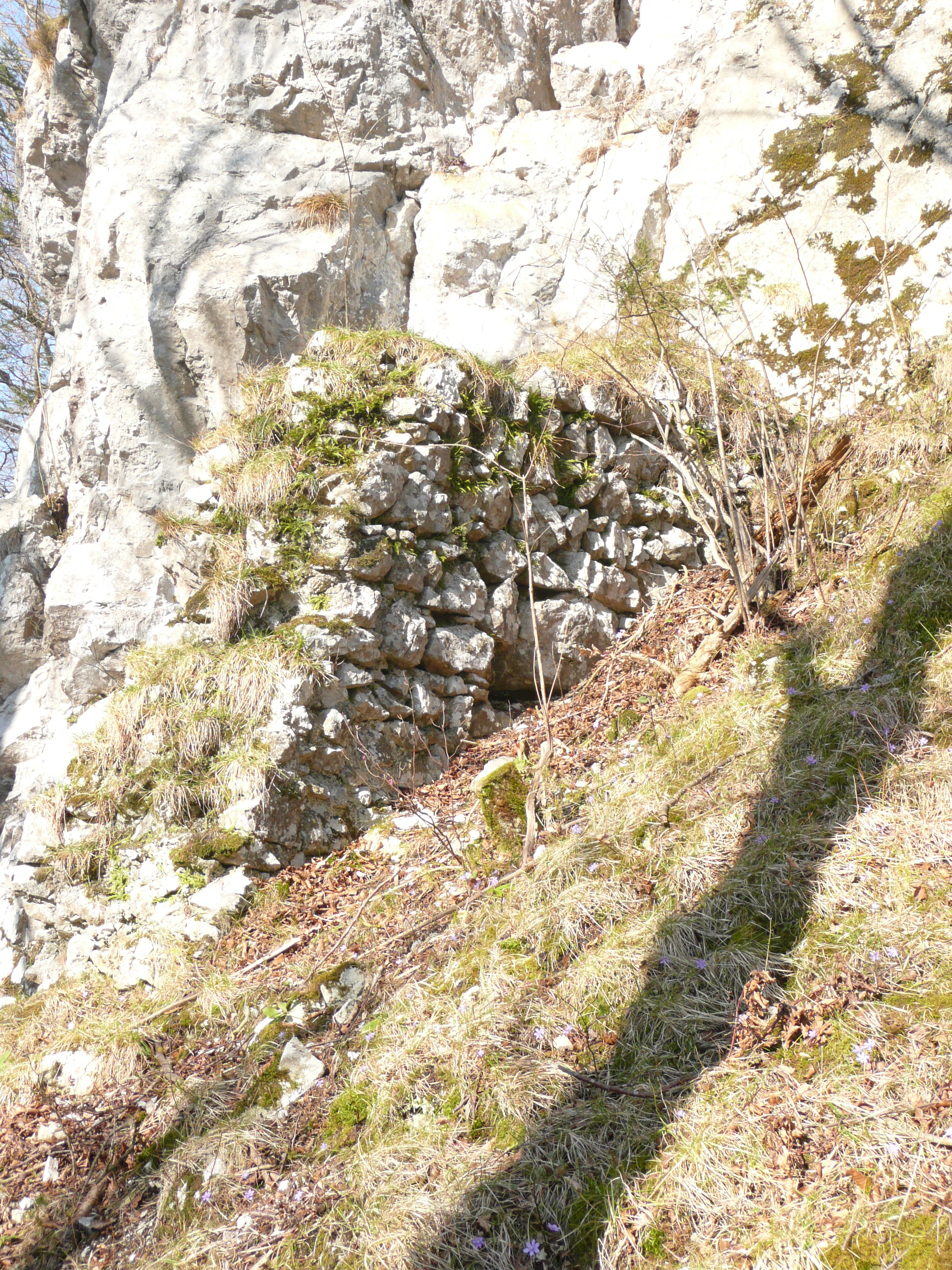 Mauerrest Ruine Leonstein OÖ